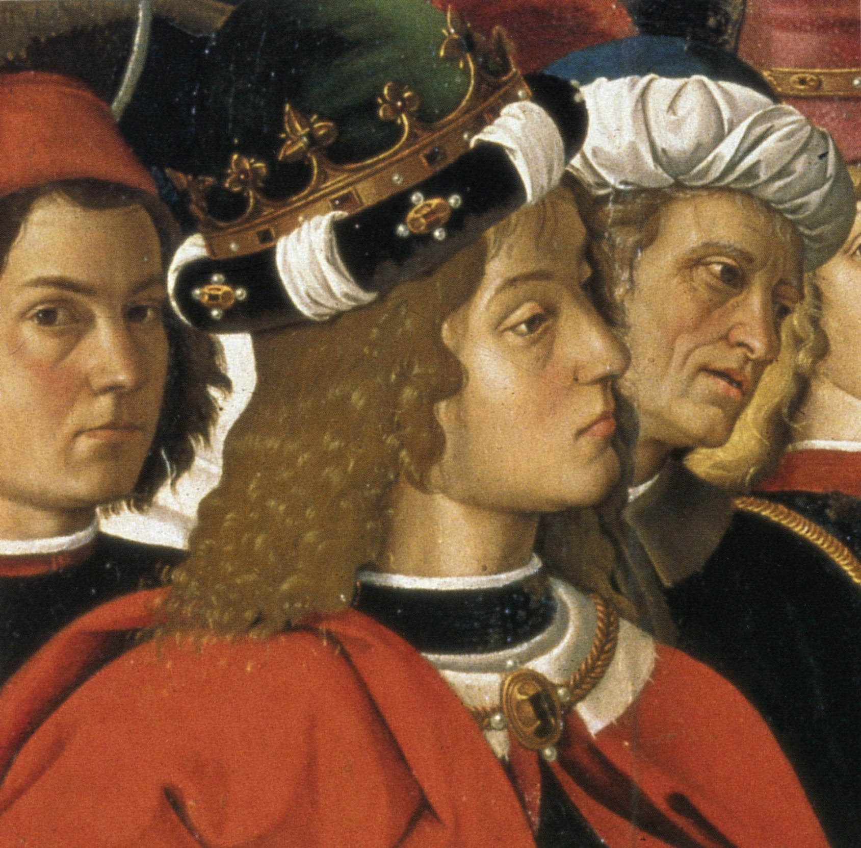 Pietro Perugino: Adorazione dei Magi. (detail/particolare) Cat. no. 6 in Vittoria Garibaldi: Perugino. Catalogo completo. Octavo, Firenze 2000, ISBN 88-8030-091-1